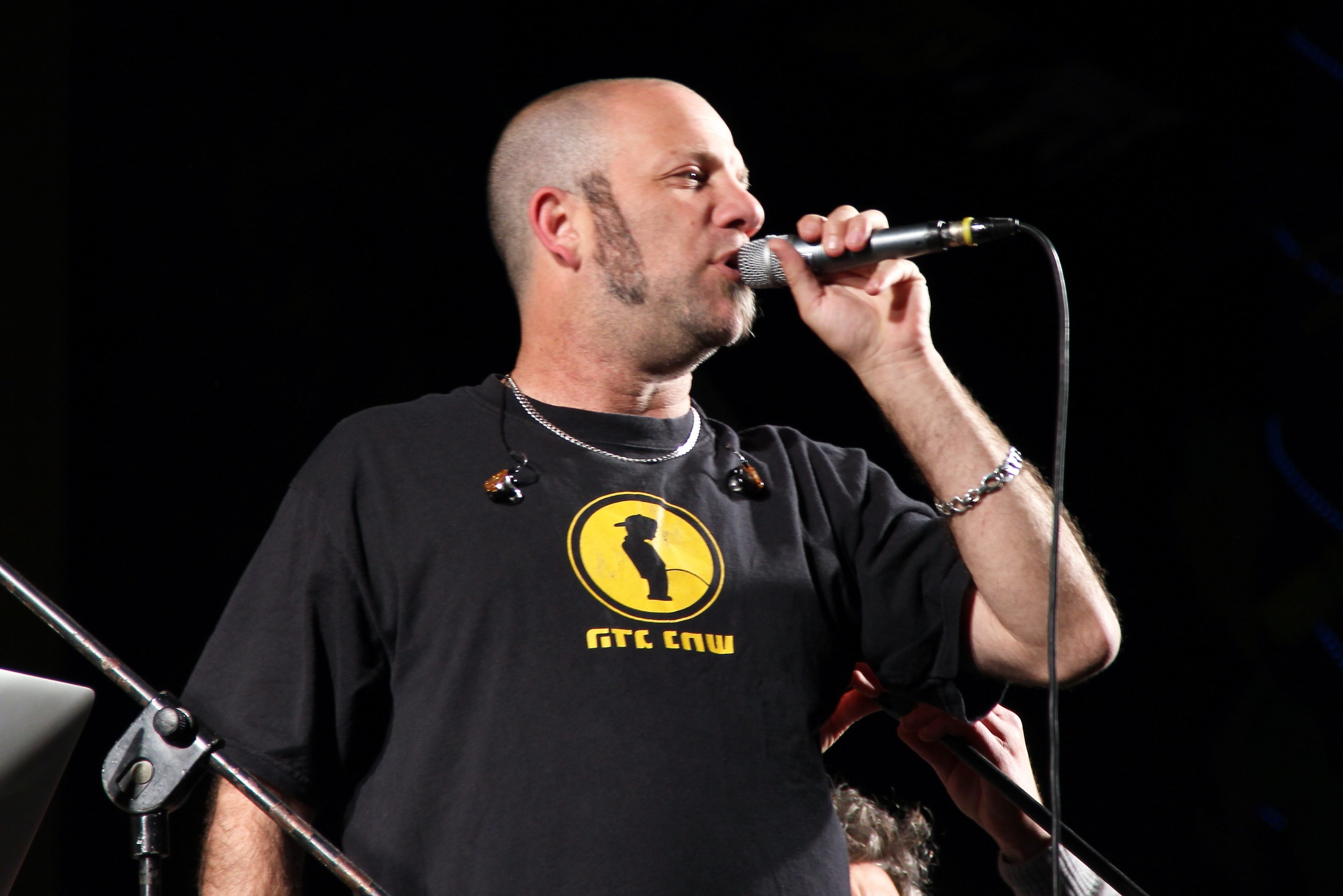 שאנן סטריט מופיע בכרמיאל, יום העצמאות 2015